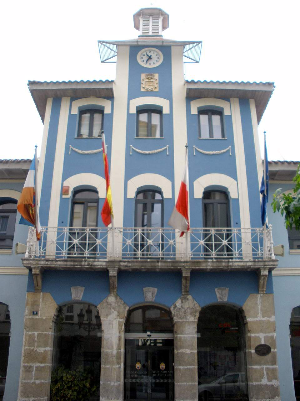 Ayuntamiento de El Astillero (Cantabria)